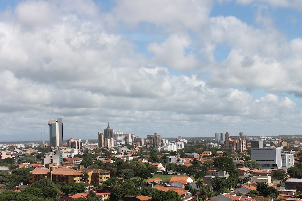 Santa Cruz de la Sierra, Bolivia, Skyline Zona norte Centro